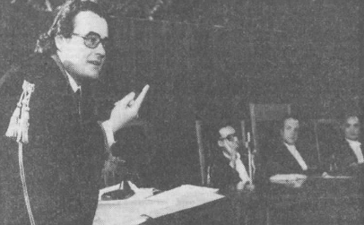 Nicola Magrone, pubblico ministero di Bari nel 1977